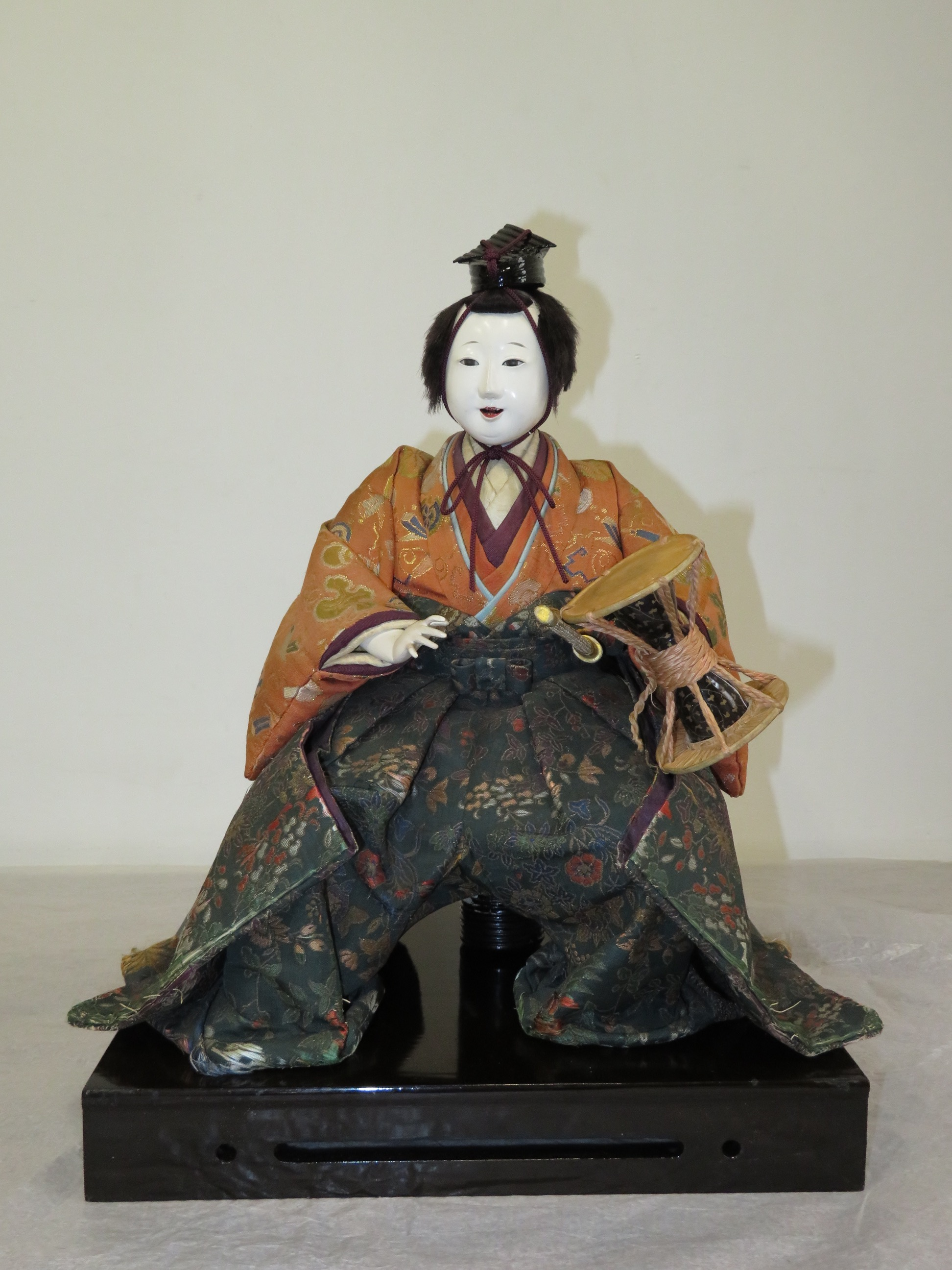 2018年2月27日-3月18日 東京国立博物館展示風景